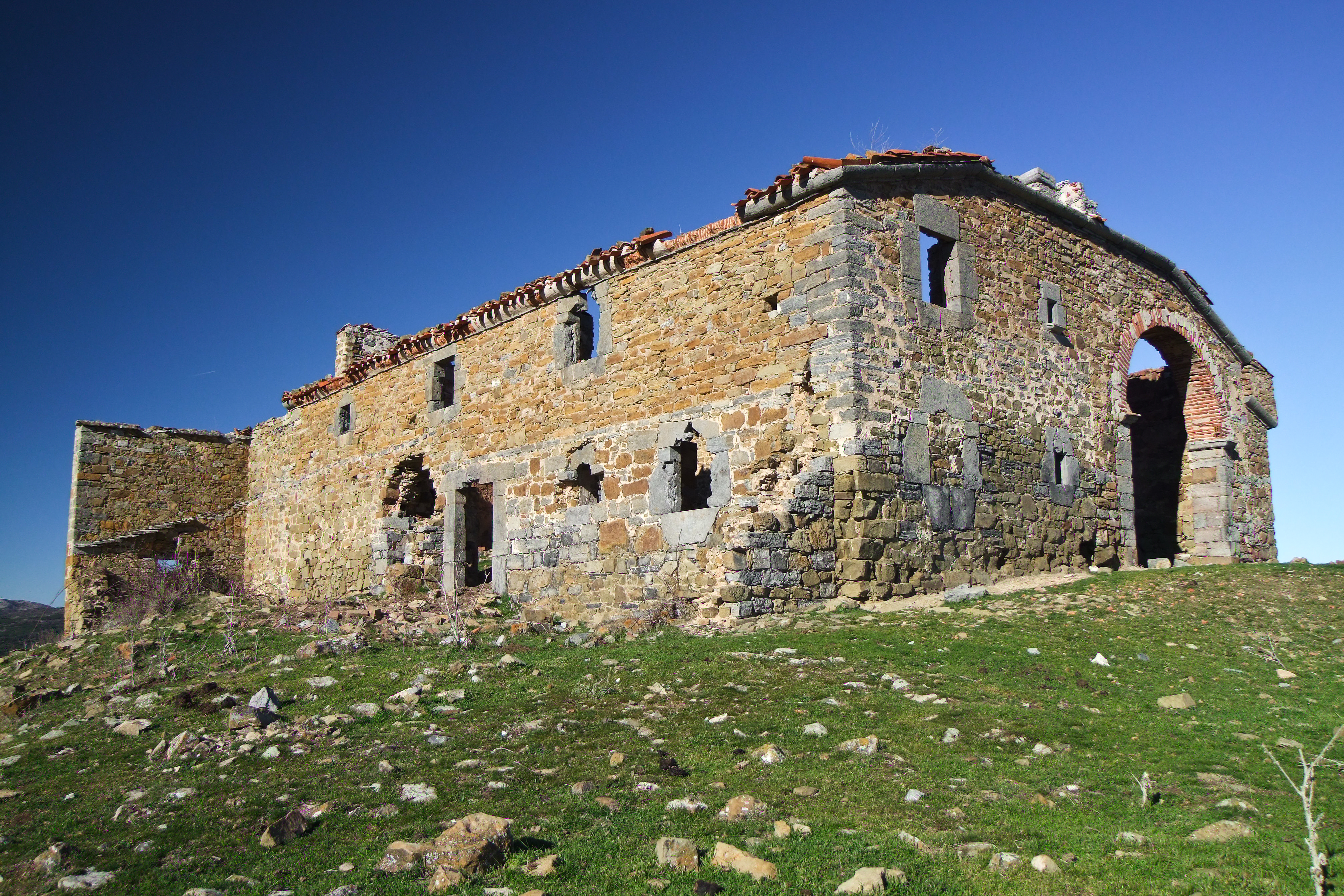 Ermita de Serrias en la localidad de Treguajantes, Soto en Cameros, La Rioja - España.